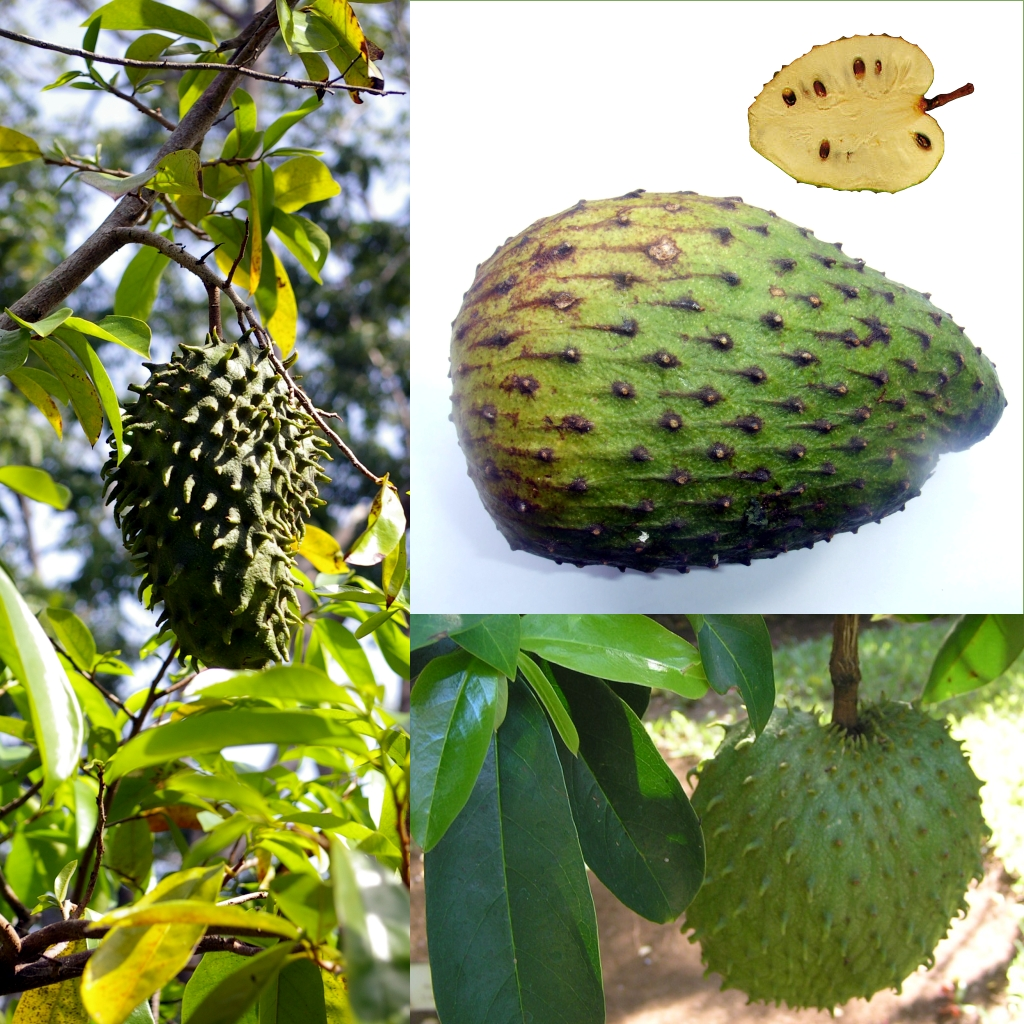 Grafika podręcznika Wikijunior:Owoce. Guanabana, graviola, sirsak, flaszowiec miękkociernisty (Annona muricata).